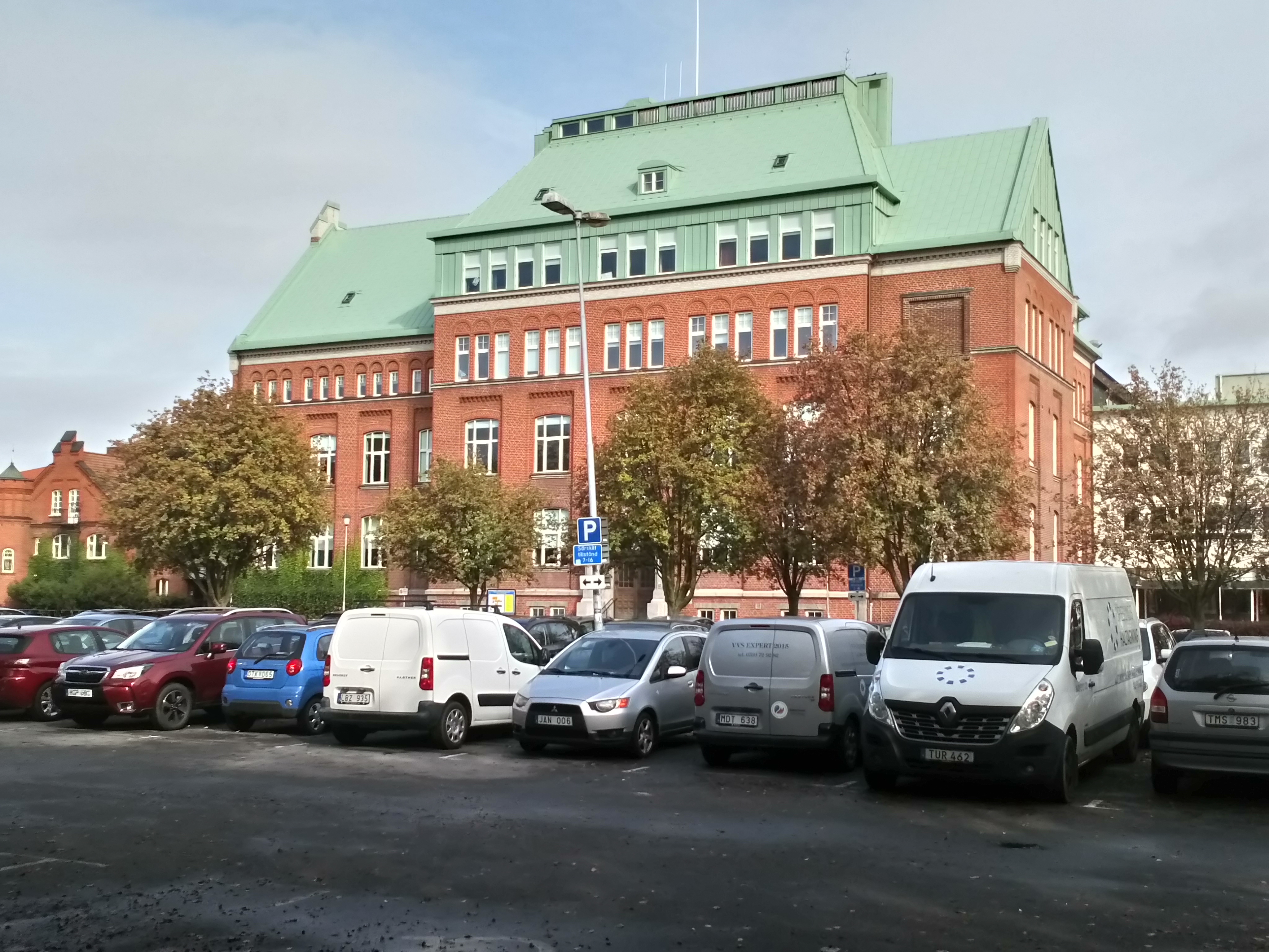 Prédio principal da unidade St. Nicolai do Söderslättsgymnasiet em Trelleborg